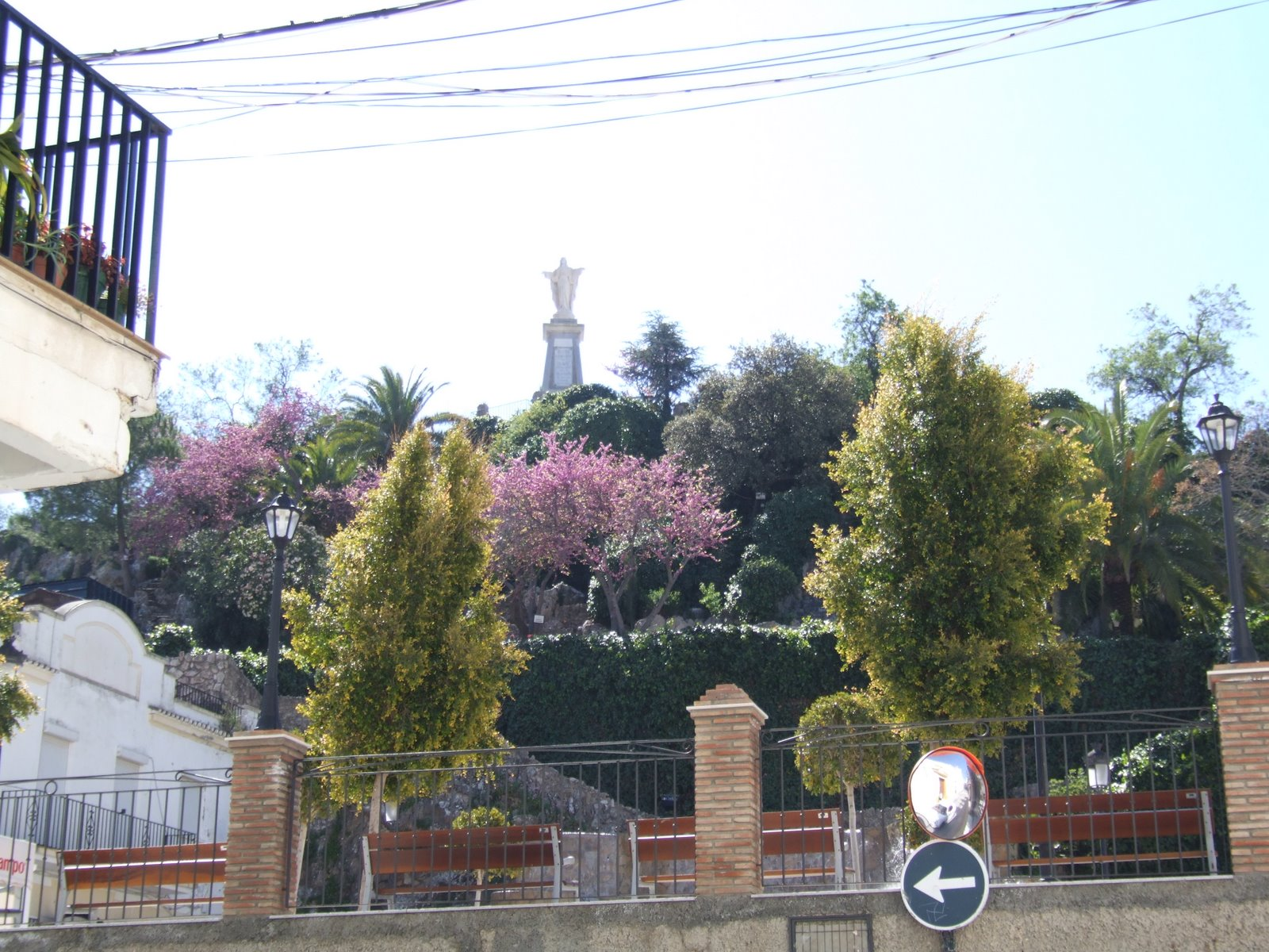 Peñon del Sagrado Corazón (Olvera)